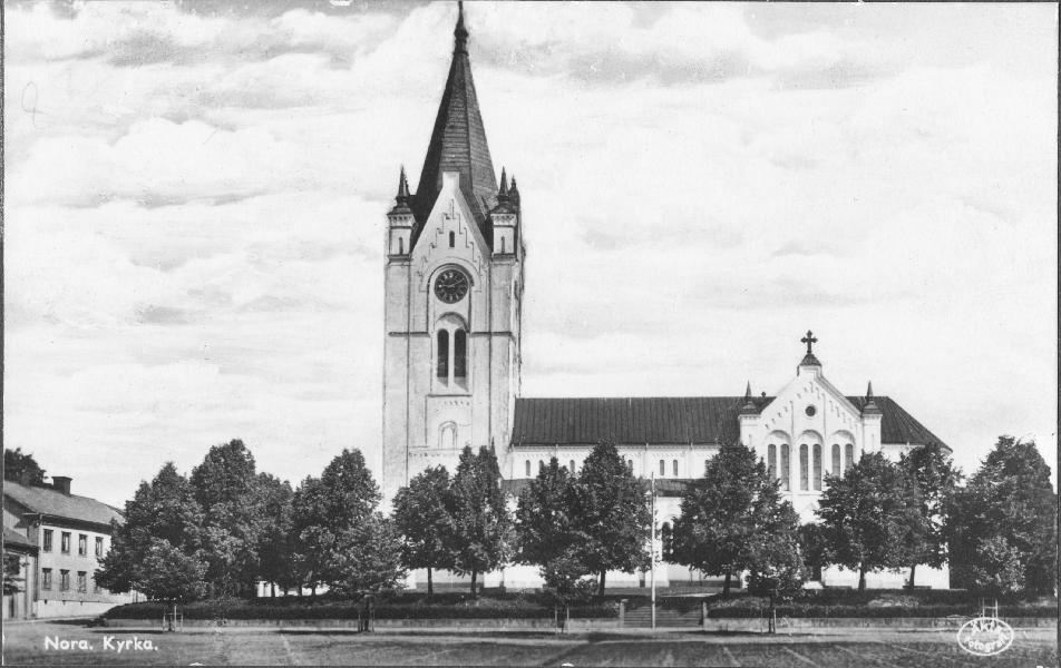 Nora stads kyrka, exteriör. Vykort. Kategori: (01) ExteriörerNora stads kyrka, exteriör. Vykort.